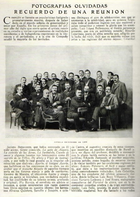 Grupo de escritores en el estudio del fotógrafo Company en marzo de 1900. Entre otros figuran Jacinto Benavente, Azorín, Ramiro de Maeztu, Pío Baroja, Joaquín y Serafín Álvarez Quintero, Luis López-Ballesteros, Ricardo J. Catarineu, Cristóbal de Castro, Eduardo Zamacois, Antonio Palomero y Luis Bello